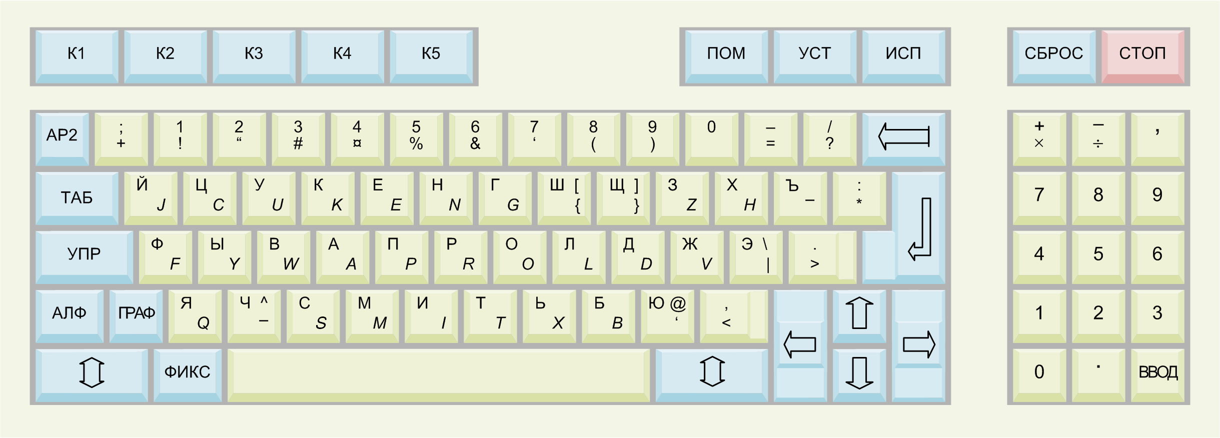 Изображение клавиатуры компьютера УКНЦ. Нарисовано мной, NZeemin.